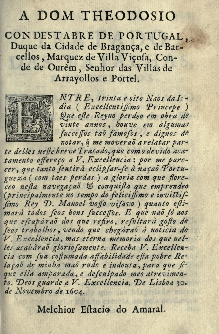 História Trágico-Marítima, Vol. II - Dedicação a D. Teodósio